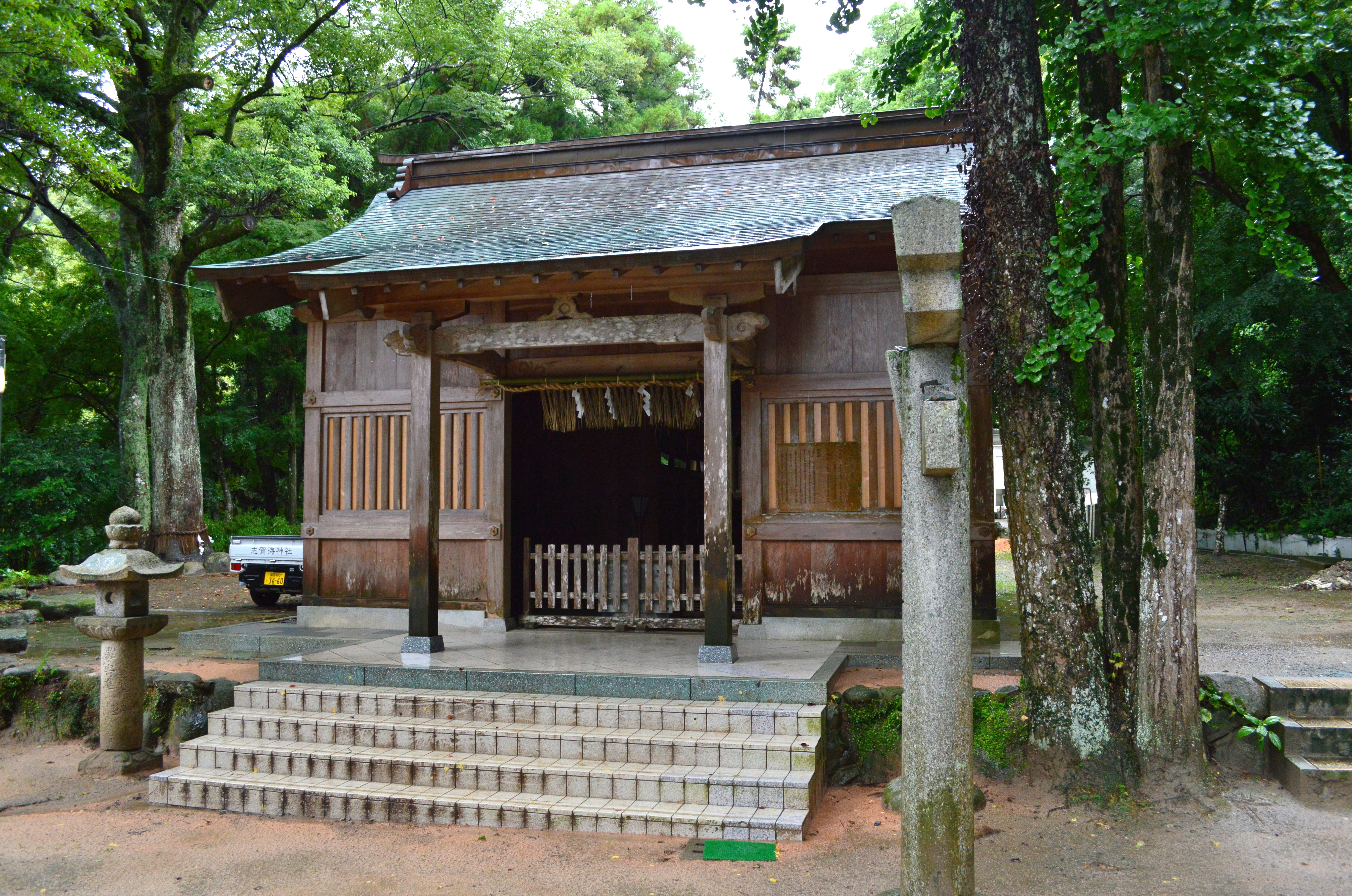 志賀海神社境内摂社 今宮神社